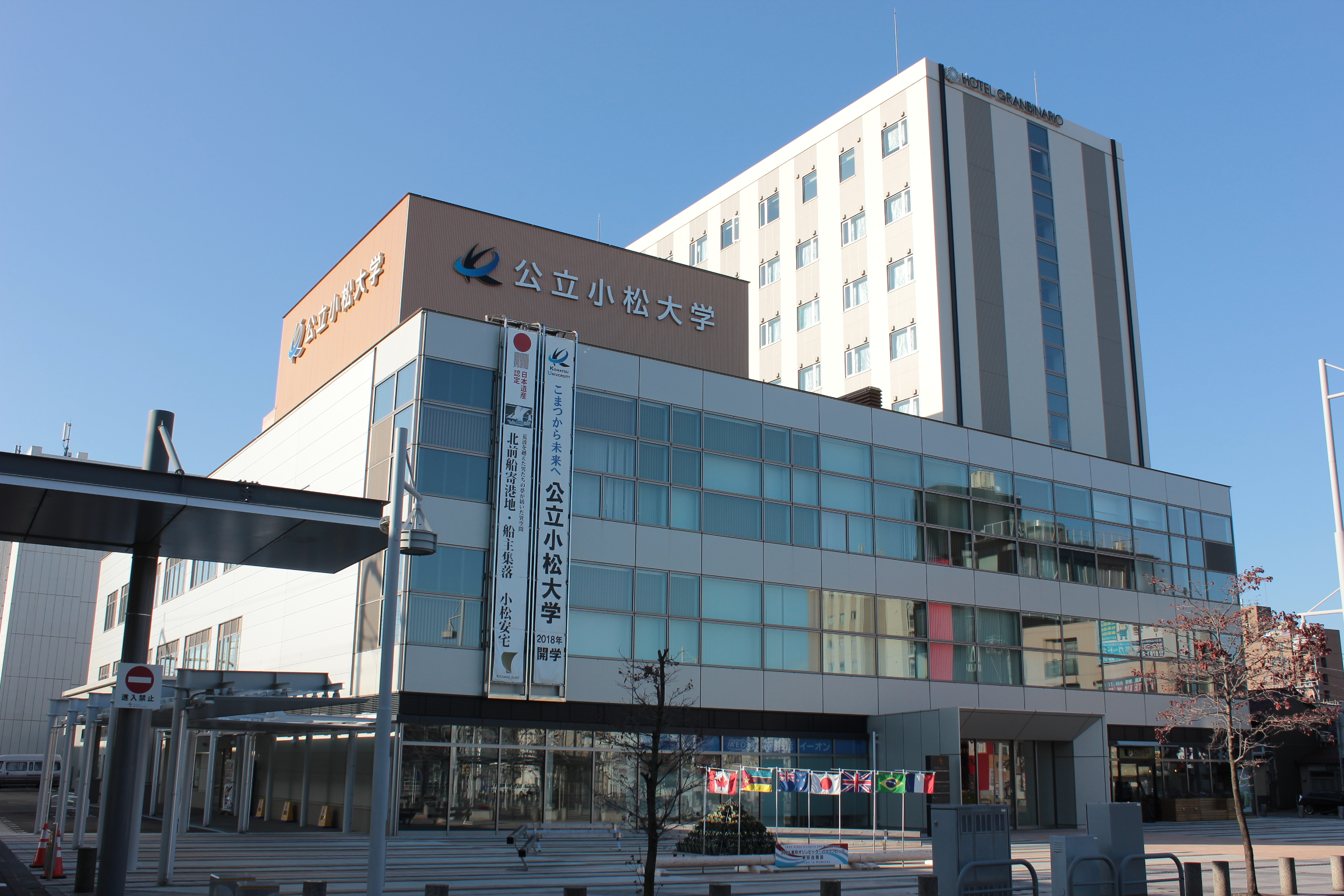 公立小松大学中央キャンパス（石川県小松市）、ホテルとの複合施設となっている。 Canon EOS Kiss X5